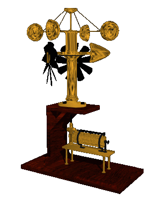 [en] weather station [ca] estació meteorològica [de] wetterstation [es] estación meteorológica [is] veðurathugunarstöð [it] stazione meteorologica [nn] meteorologisk stasjon [lt] meteorologinė stotis [no] meteorologisk stasjon [pl] stacja meteorologiczna [pt] estação meteorológica [ru] mетеостанция [uk] mетеорологічна станція